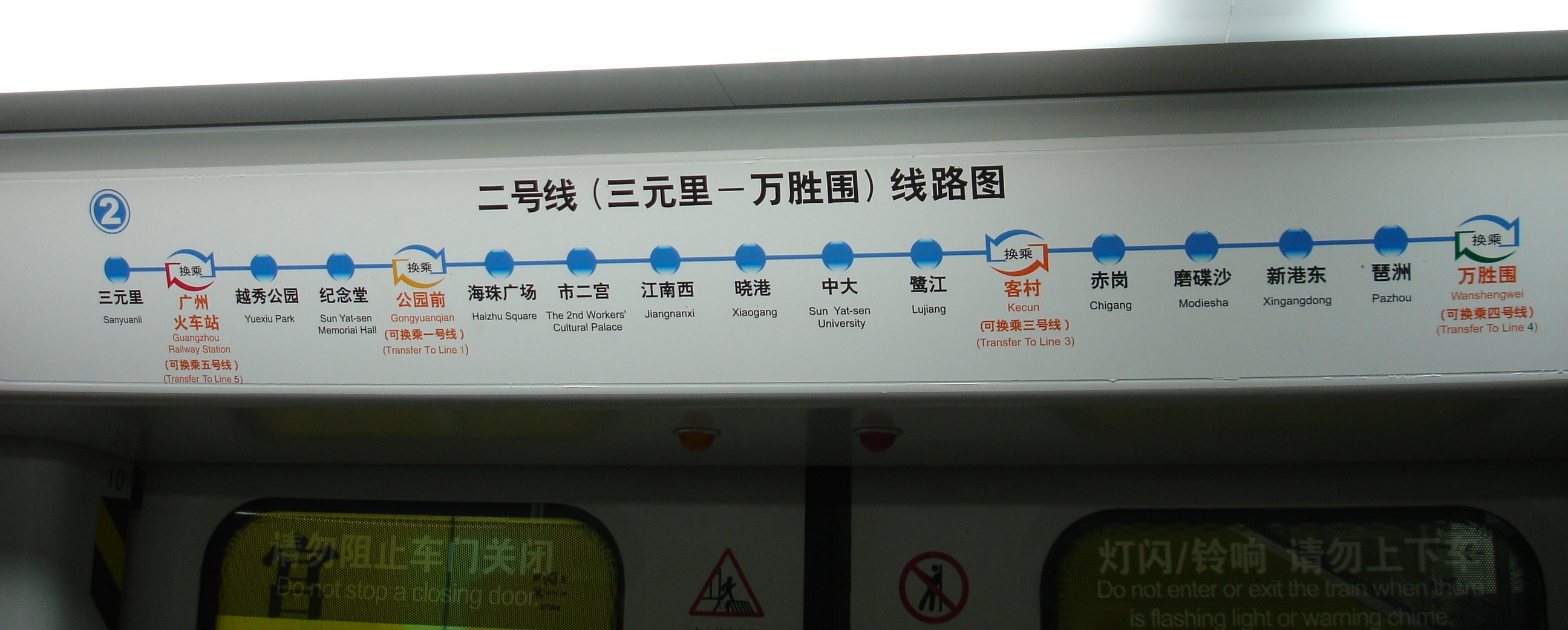 廣州地鐵2號線拆解前的列車線路圖貼紙